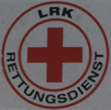 Liechtensteinisches Rotes Kreuz (LRK) - Einsatzfahrzeug - Detail: Emblem LRK, Landesspital in Vaduz